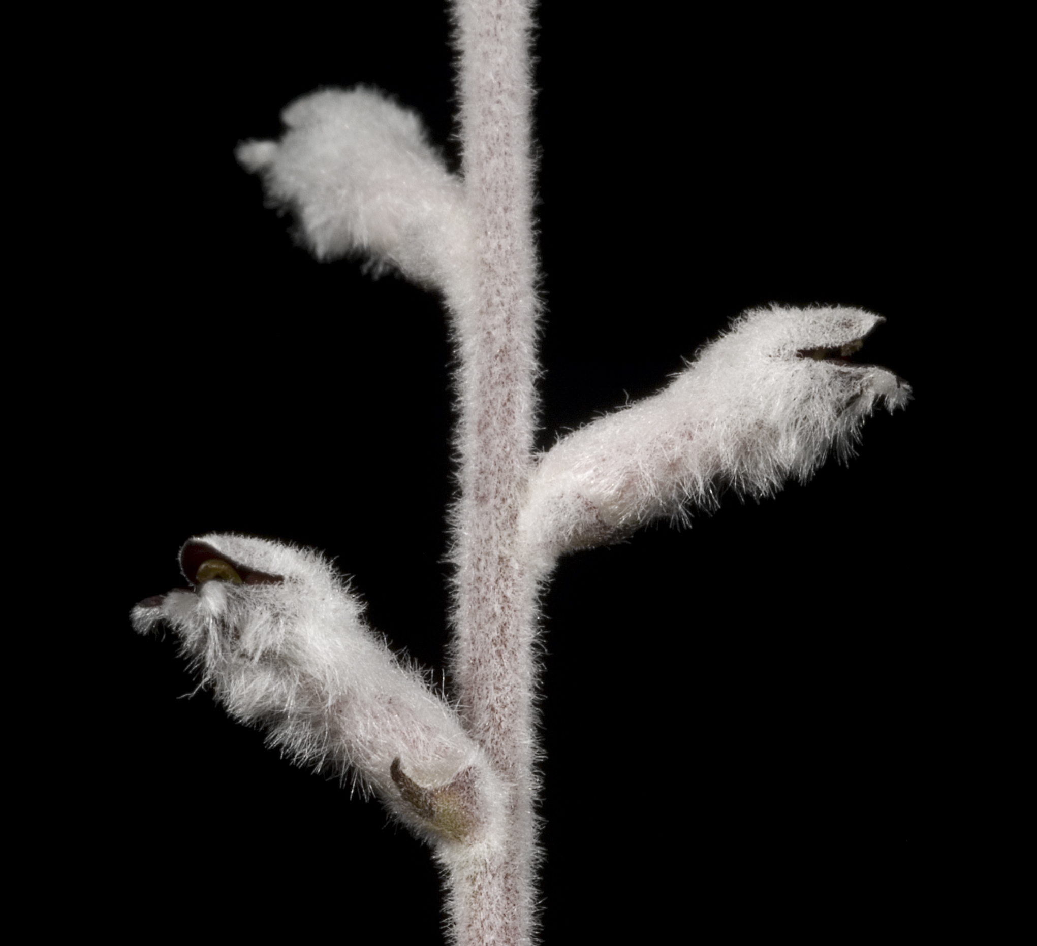 KRT3322